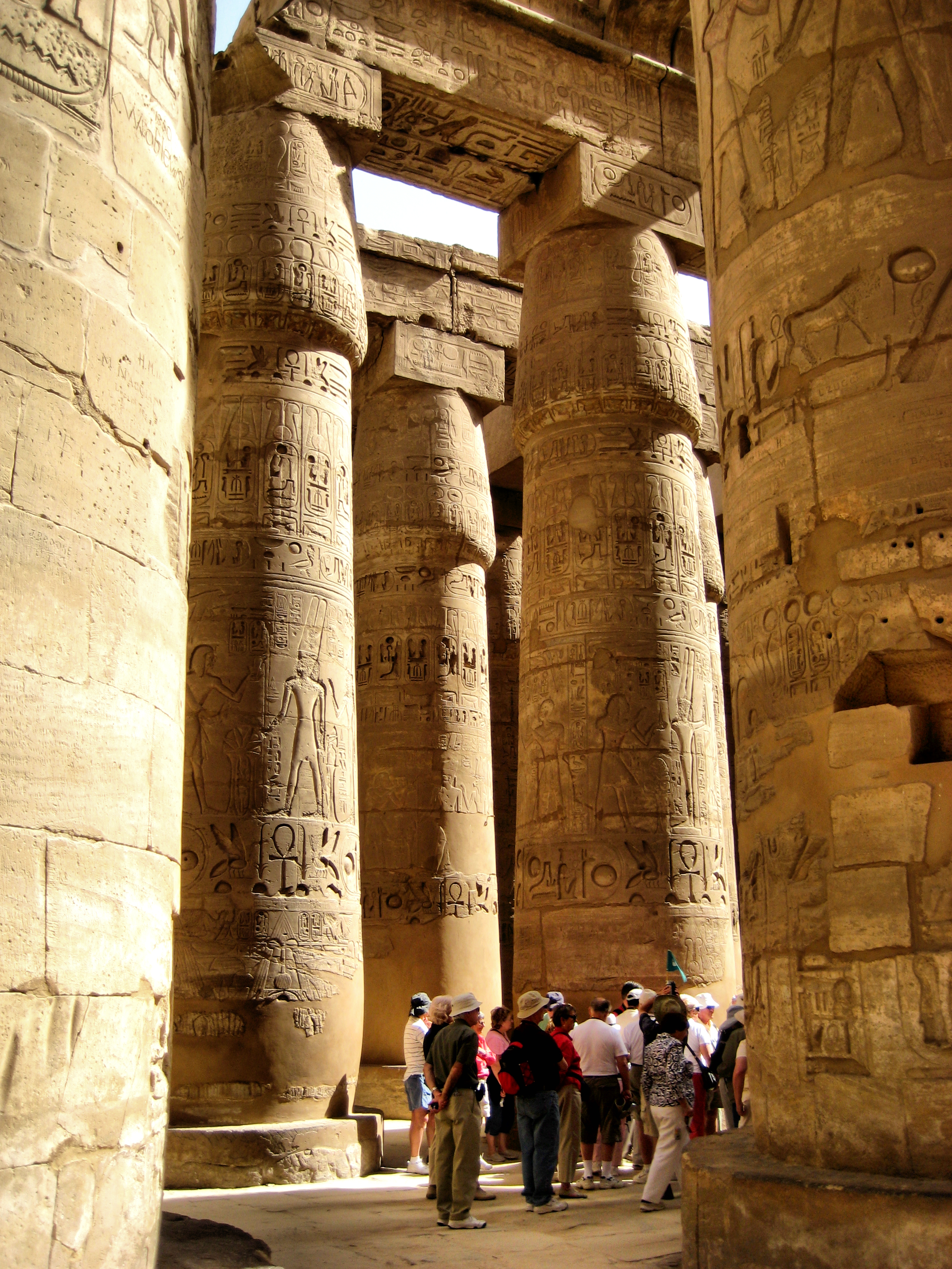 Karnak Columns